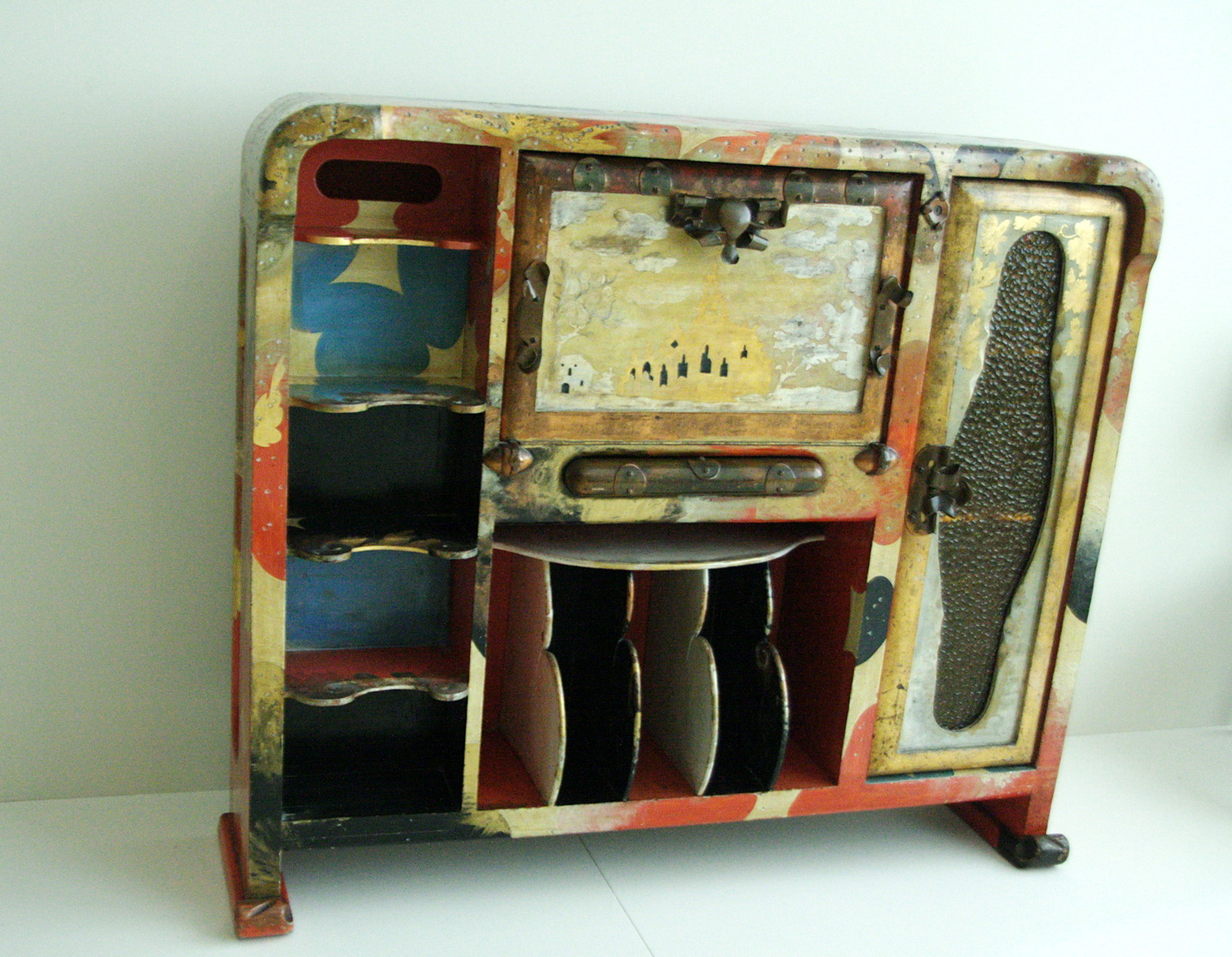 Moble dissenyat per Josep Maria Jujol, que va estar a la botiga de "mobles moderns" de Pere Mañach (1911)